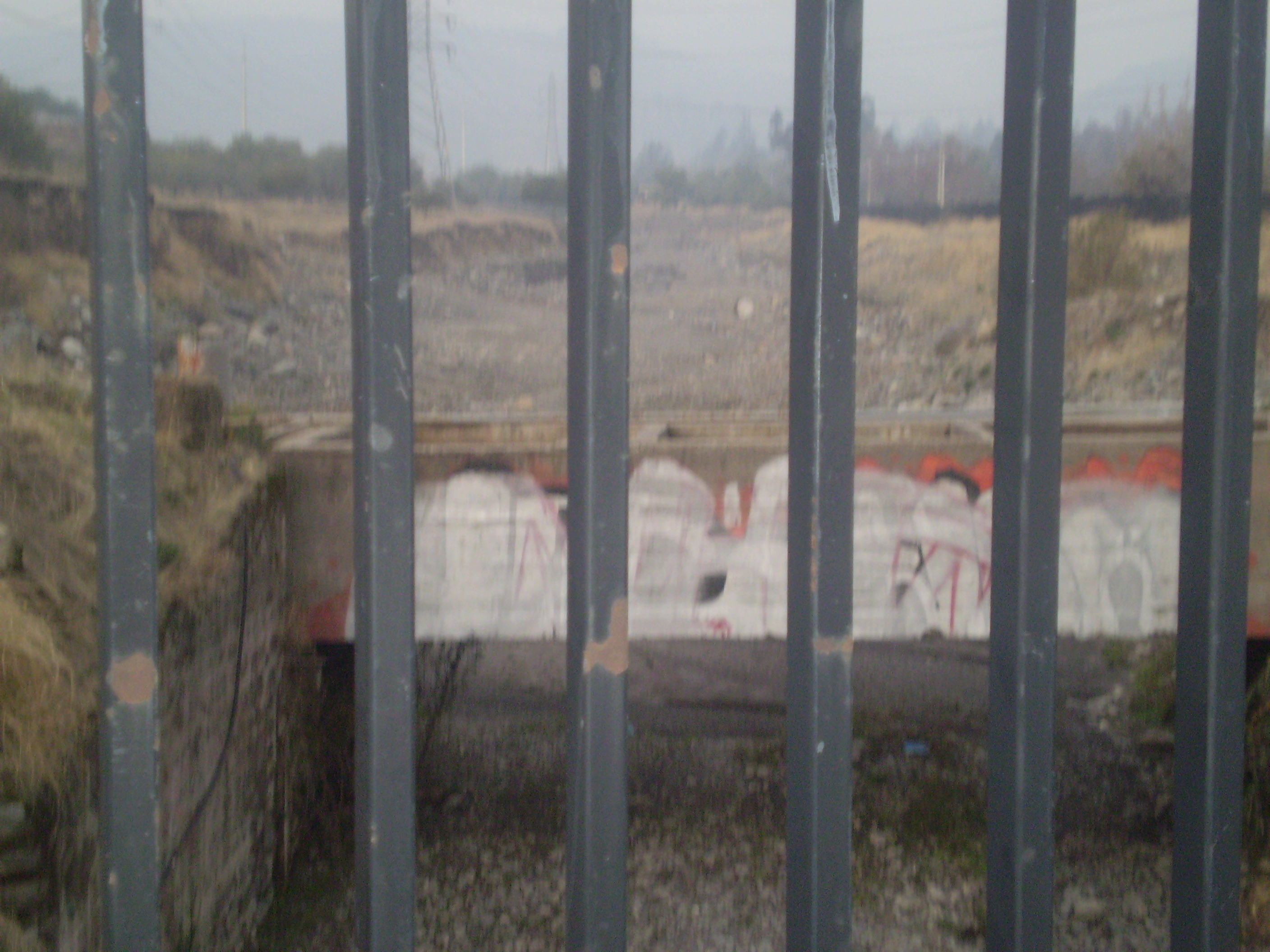 un canal chileno